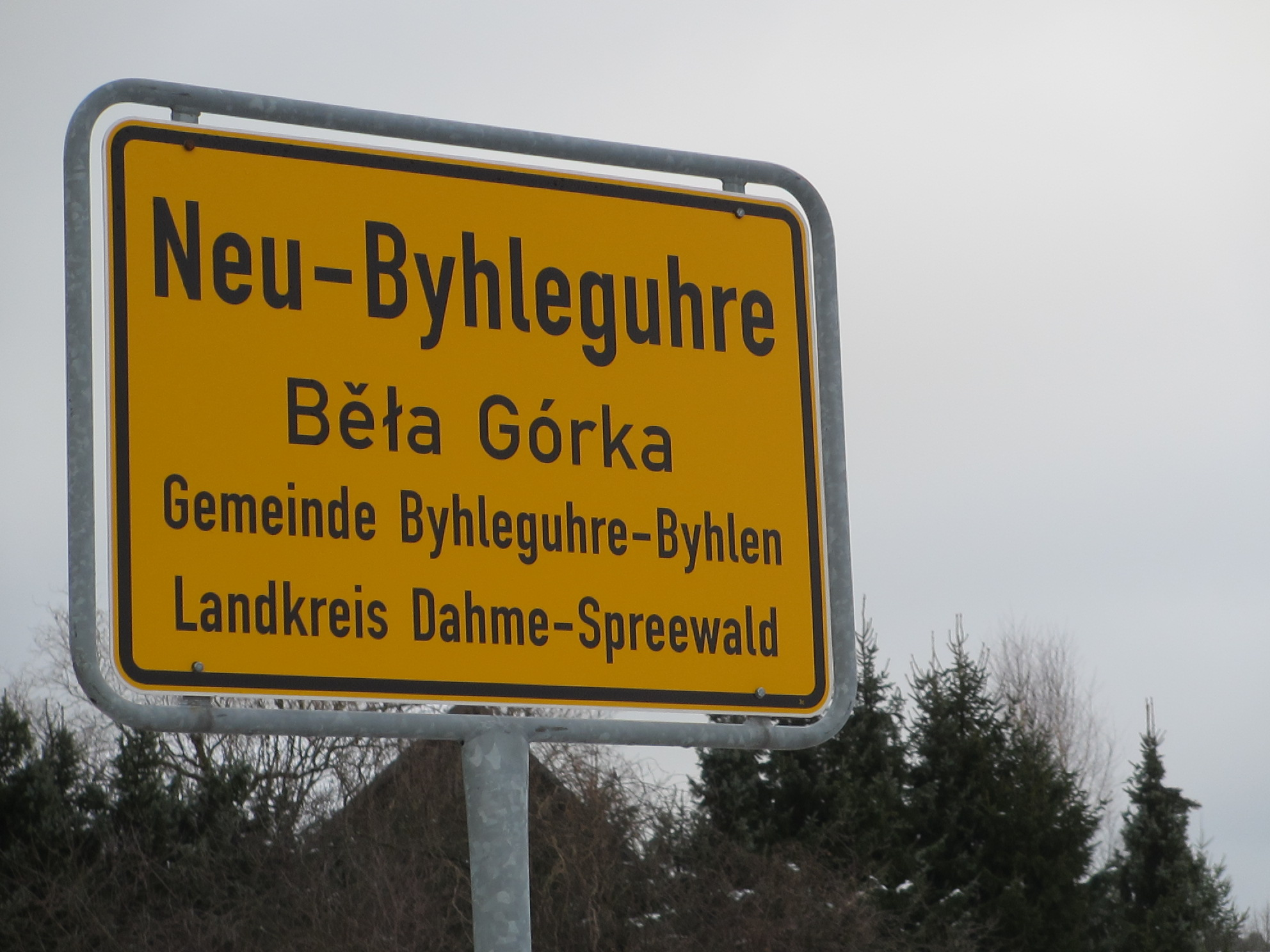 Ortsschild Neu-Byhleguhre